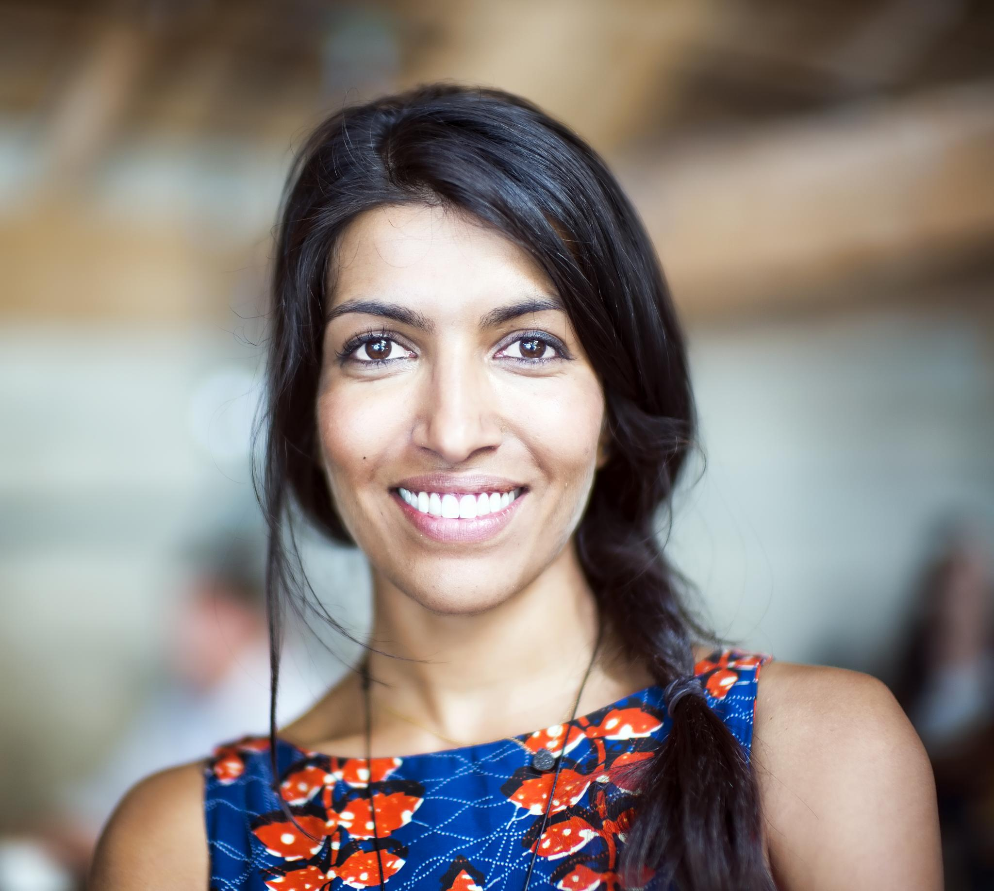 Leila Janah